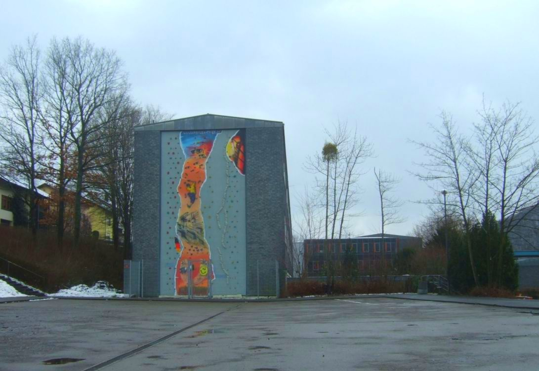 Regionalschule Waldrach